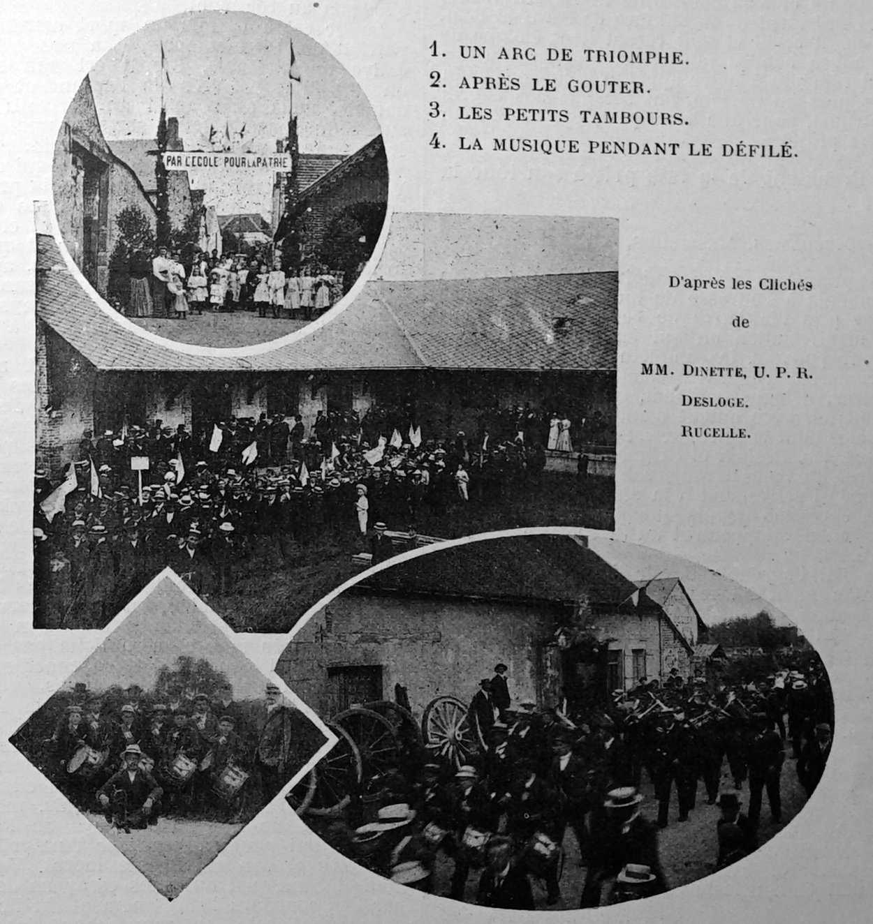 publié dans le "Bulletin de l'œuvre des voyages scolaires".